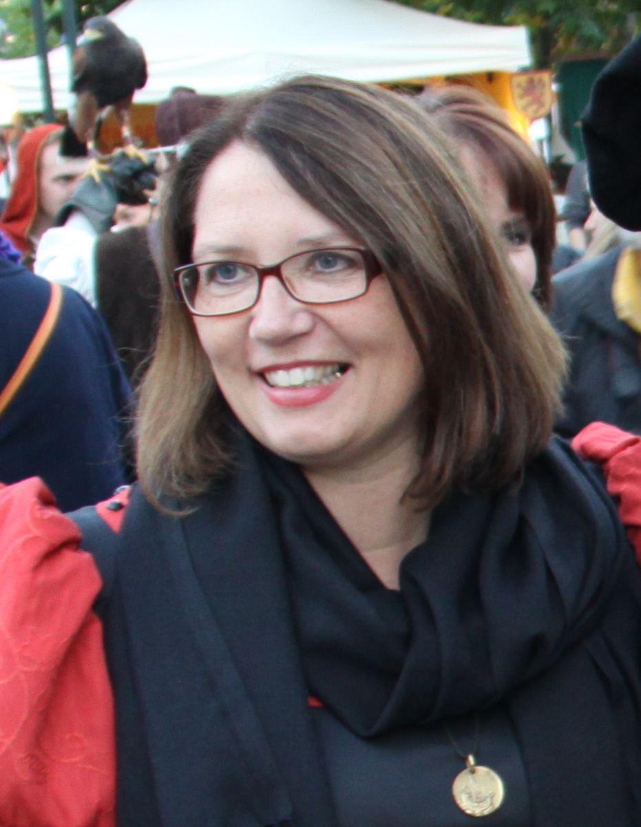 Sabine Danicke mit der Bürgermeisterin der Hansestadt Wesel, einer Partnerstadt der Hansestadt Salzwedel 2013